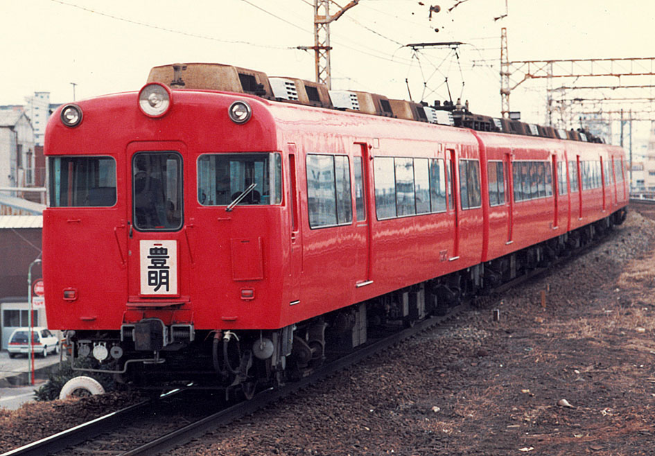 名古屋鉄道 7300系